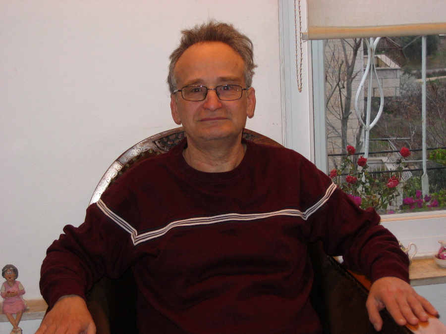 Saharon Shelah in Jerusalem